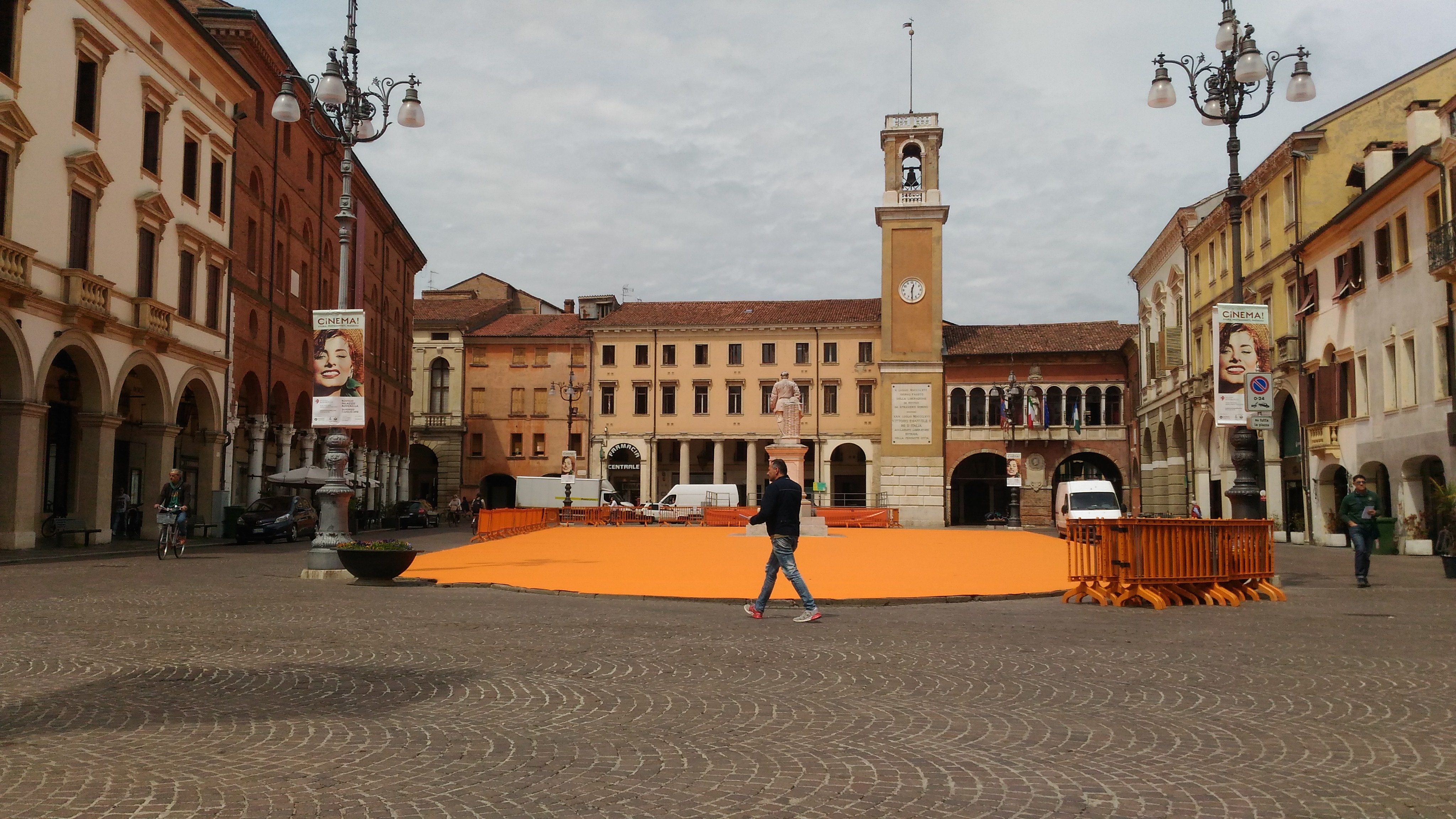 Rovigo, la centrale piazza Vittorio Emanuele II con il liston coperto da un panno arancione in occasione della manifestazione Rovigoracconta 2018.